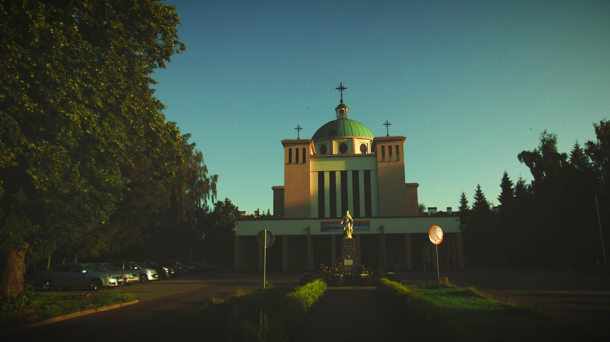 Starogard Gdański, Kościół św. Wojciecha w Starogardzie Gdańskim Wikidata has entry Q16569302 with data related to this item.